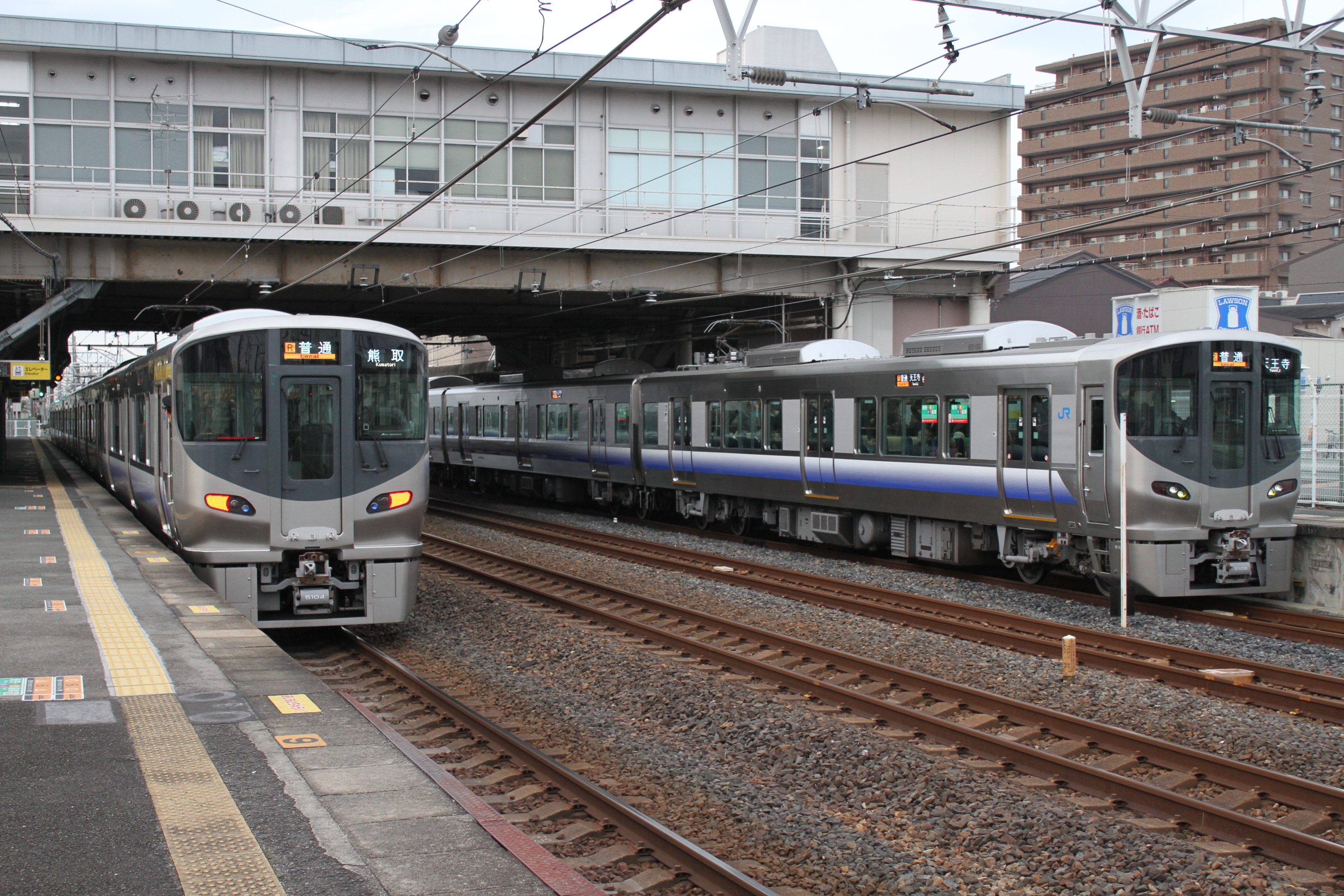 阪和線 普通列車並び 上野芝駅にて